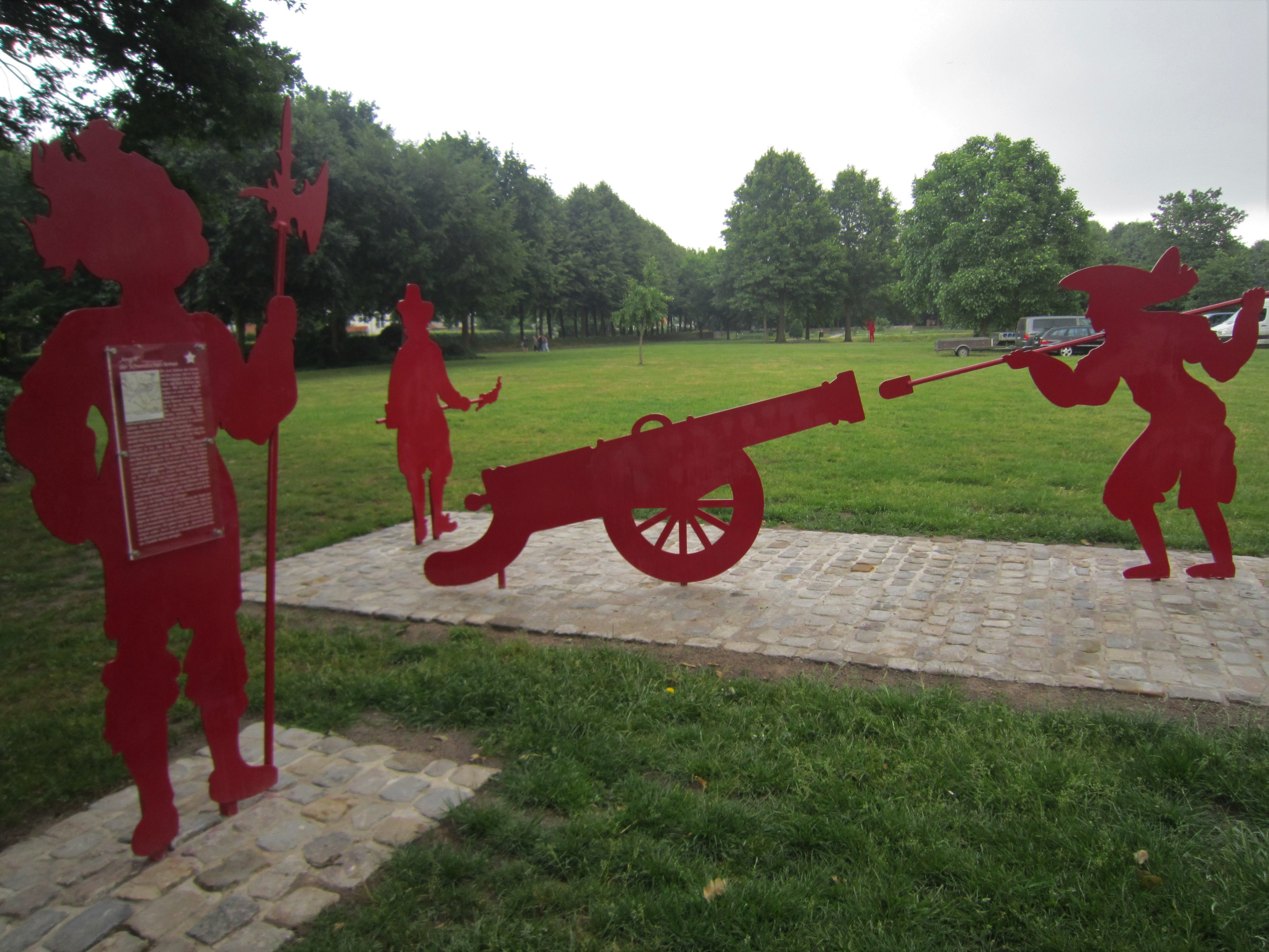 Simulation eines Angriffs durch schwedische Truppen im 17. Jahrhundert auf die Zitadelle Vechta